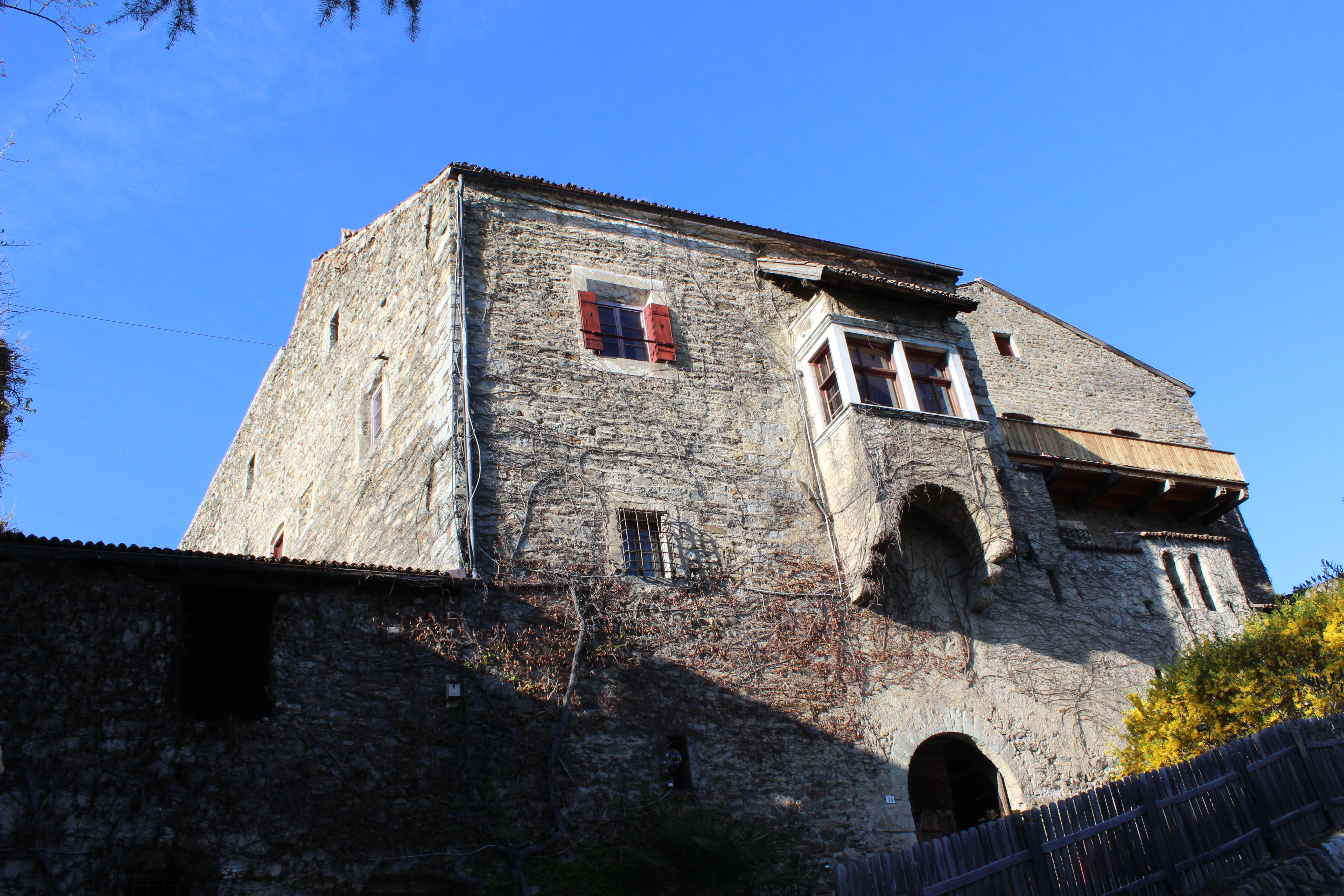 Schloss Auer in Dorf Tirol (Südtirol) Hauptgebäude Südansicht, im Innenhof